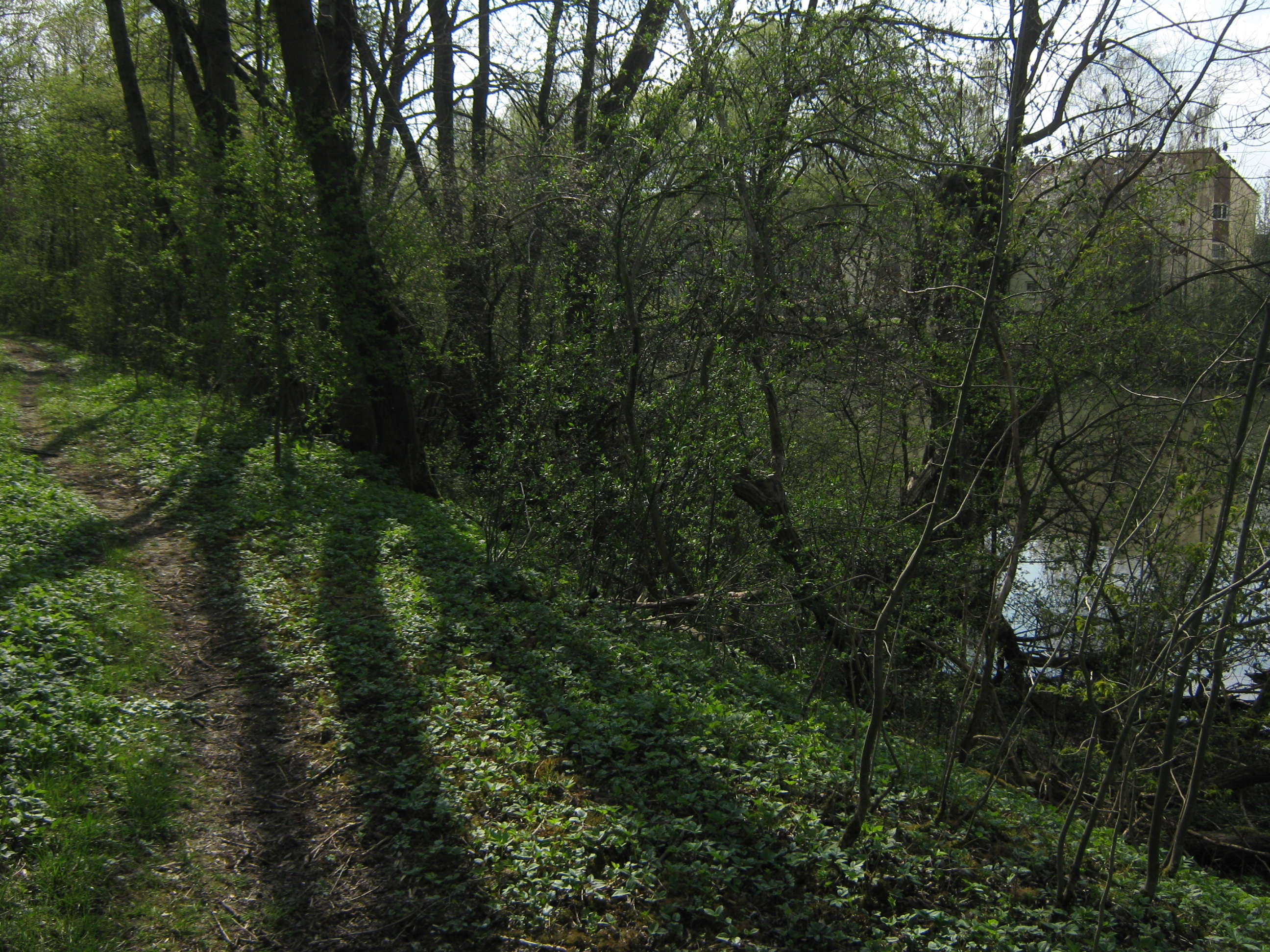 Seitenarm des Neckar im Naturschutzgebiet Alter Neckar